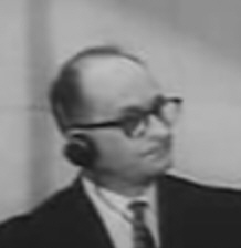 Adolf Eichmann (* 1906; † 1962), SS-Obersturmbannführer und Kriegsverbrecher, während der Gerichtsverhandlung in Israel 1962. Von mir angefertigter Screenshot aus einem Wochenschaubericht, der vom Rechteinhaber in die Gemeinfreiheit entlassen wurde und auf Commons verfügbar ist (siehe Quelle).